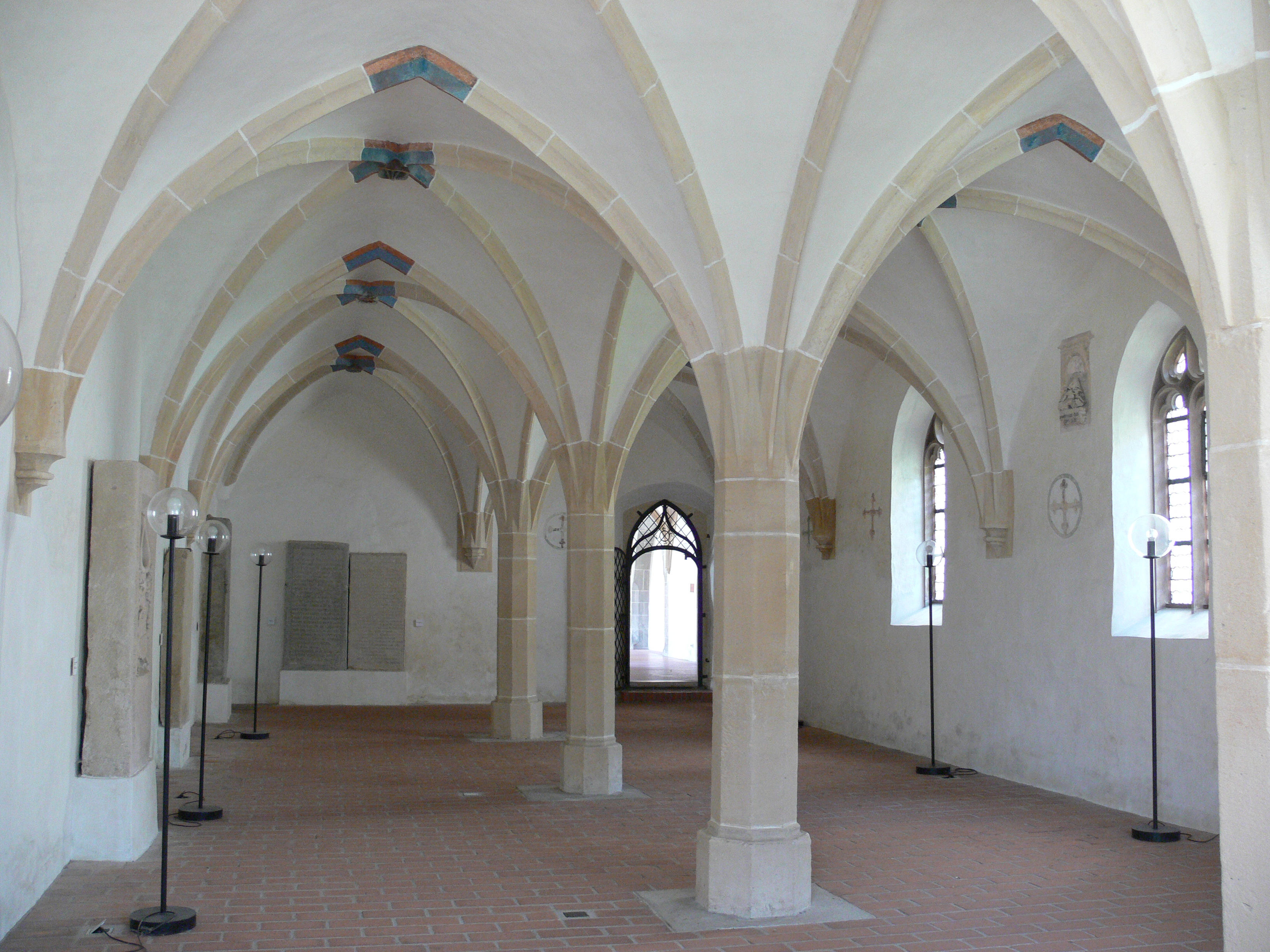 Kloster Blaubeuren, Kapitelsaal